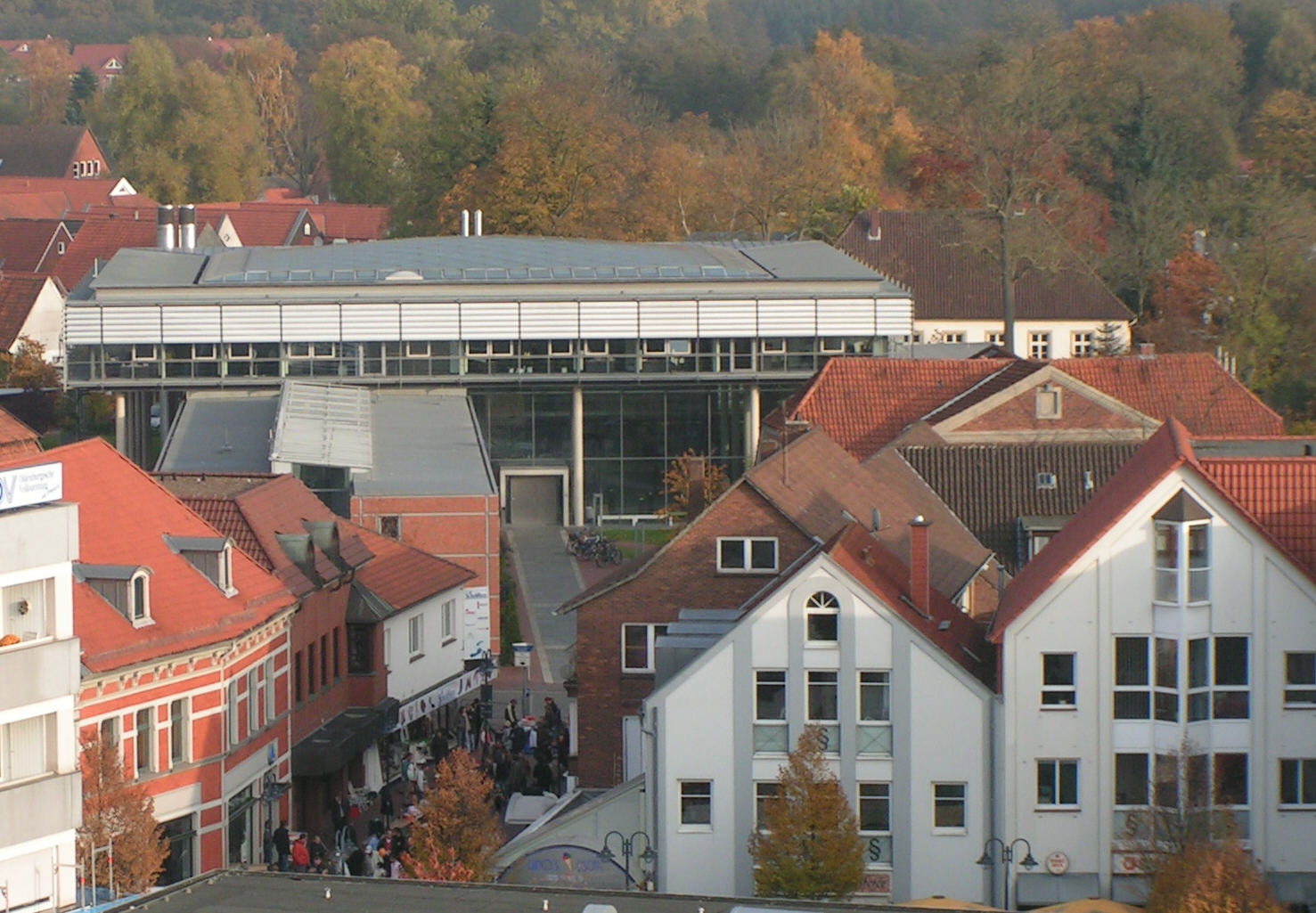 Neues (links) und Altes (dahinter rechts) Rathaus und Vechta